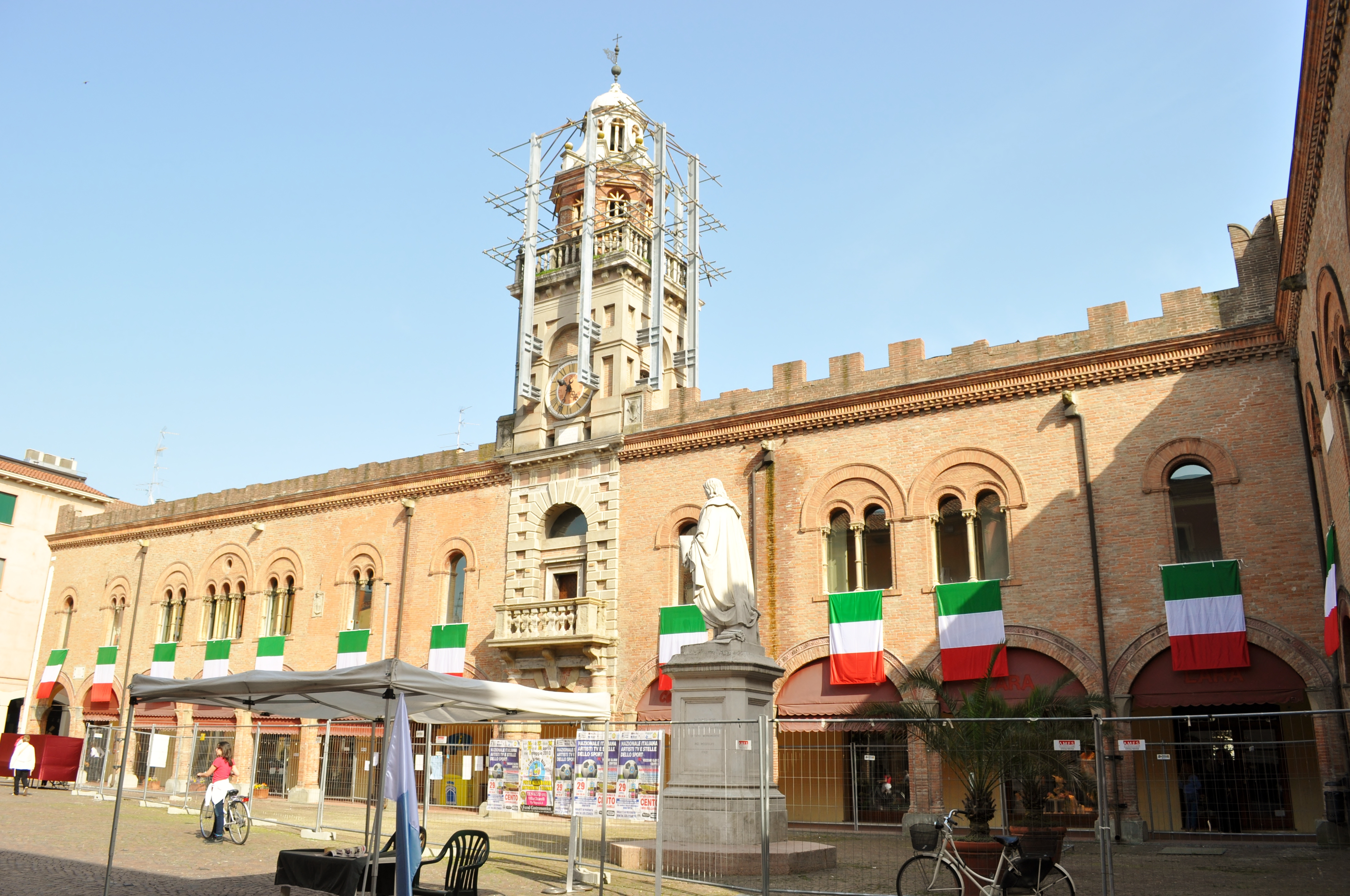 Palazzo del Governatore - MiBAC This is a photo of a monument which is part of cultural heritage of Italy.